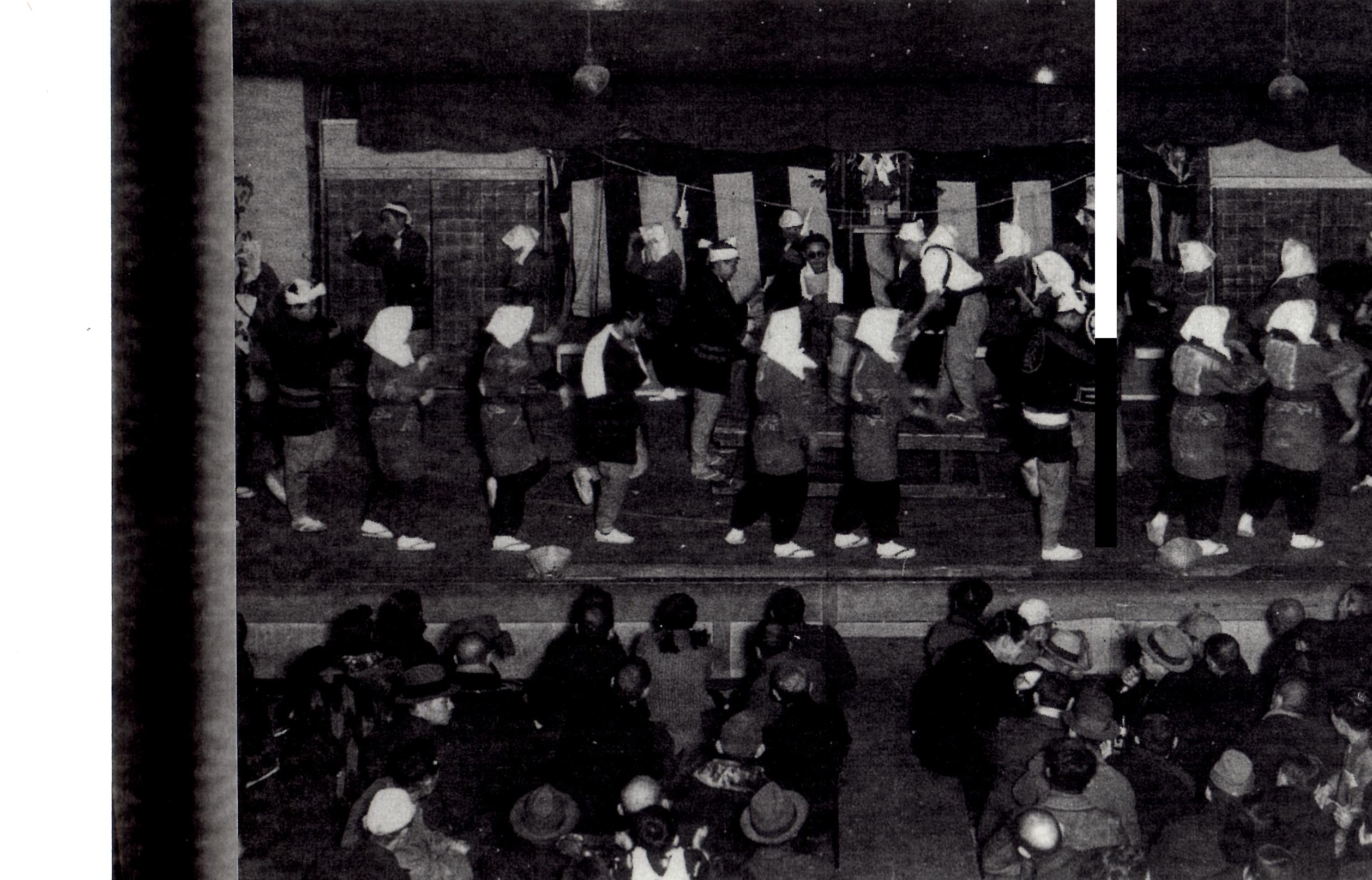 愛知県安城市・安城座での碧海おどり 1947年